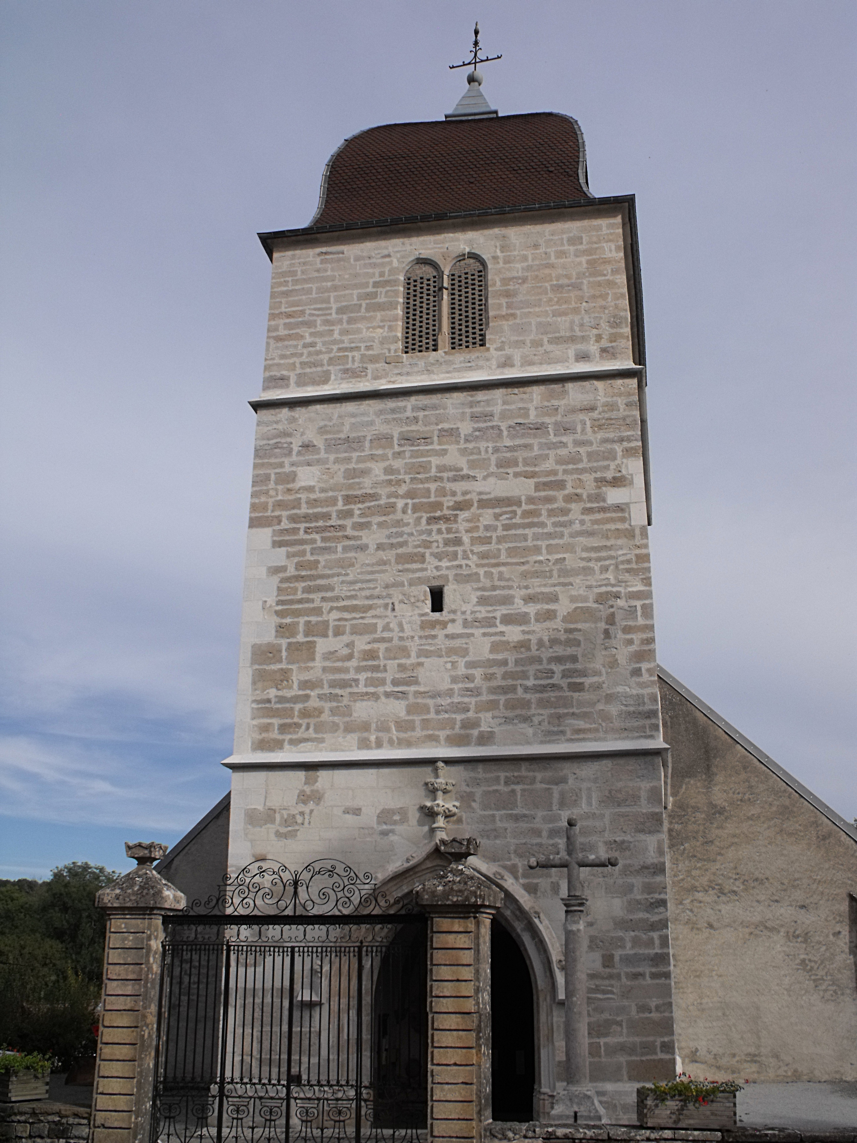 Eglise de Huanne-Montmartin, Doubs, France